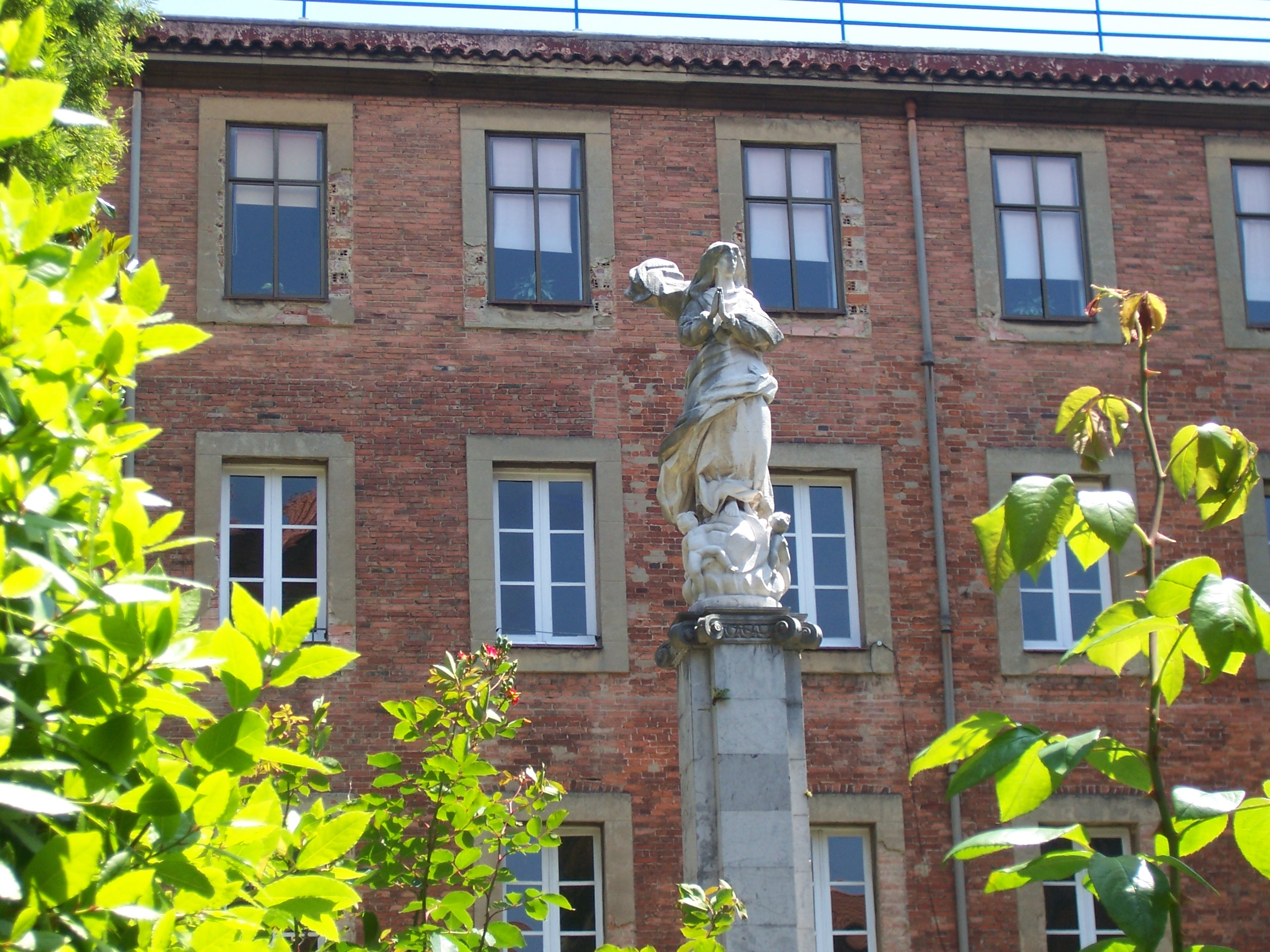 Escultura de la Vírgen Inmaculada en el jardín del colegio de la Inmaculada en Gijón, España.